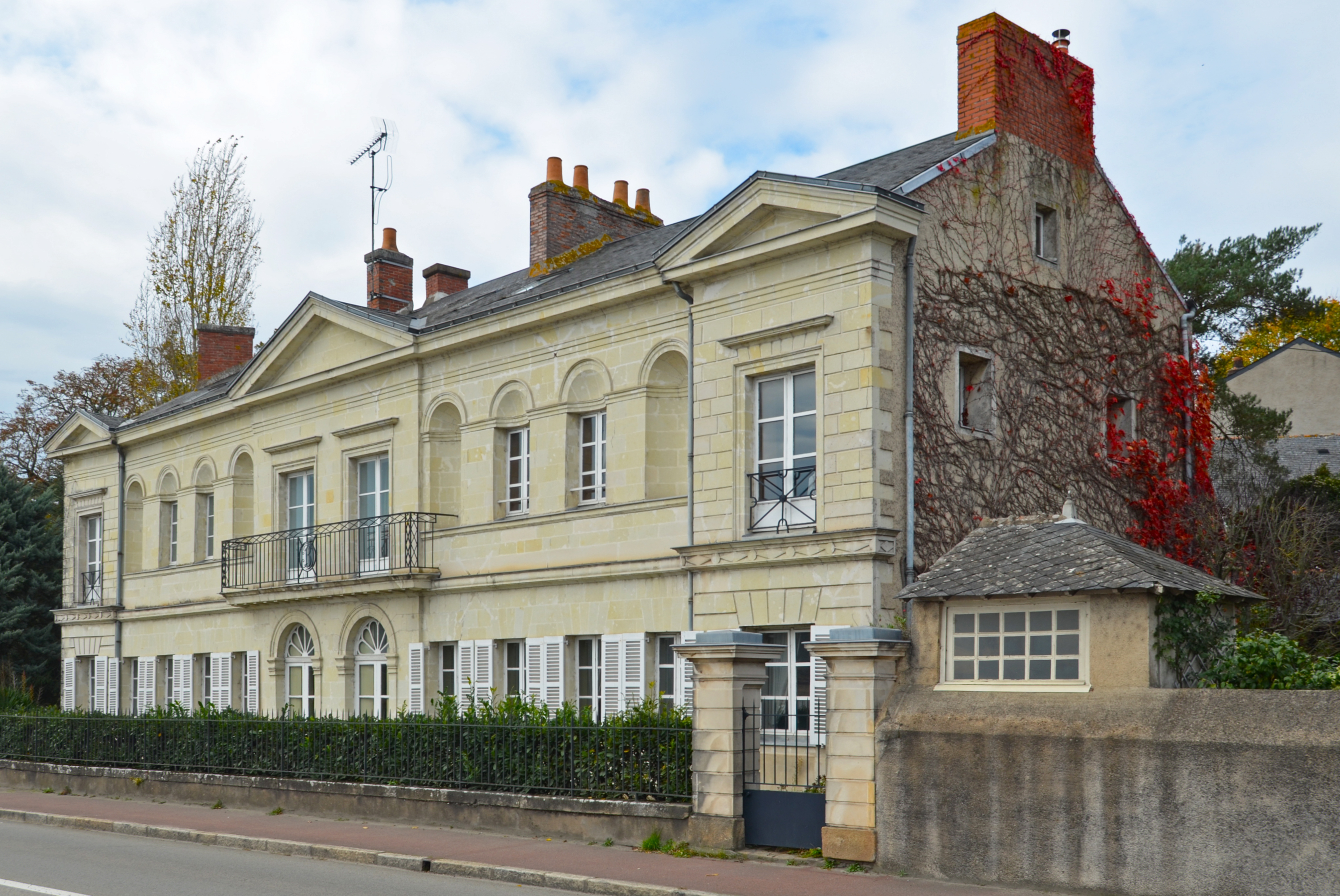 Villa de la Douvelière - Ancenis (Loire-Atlantique)